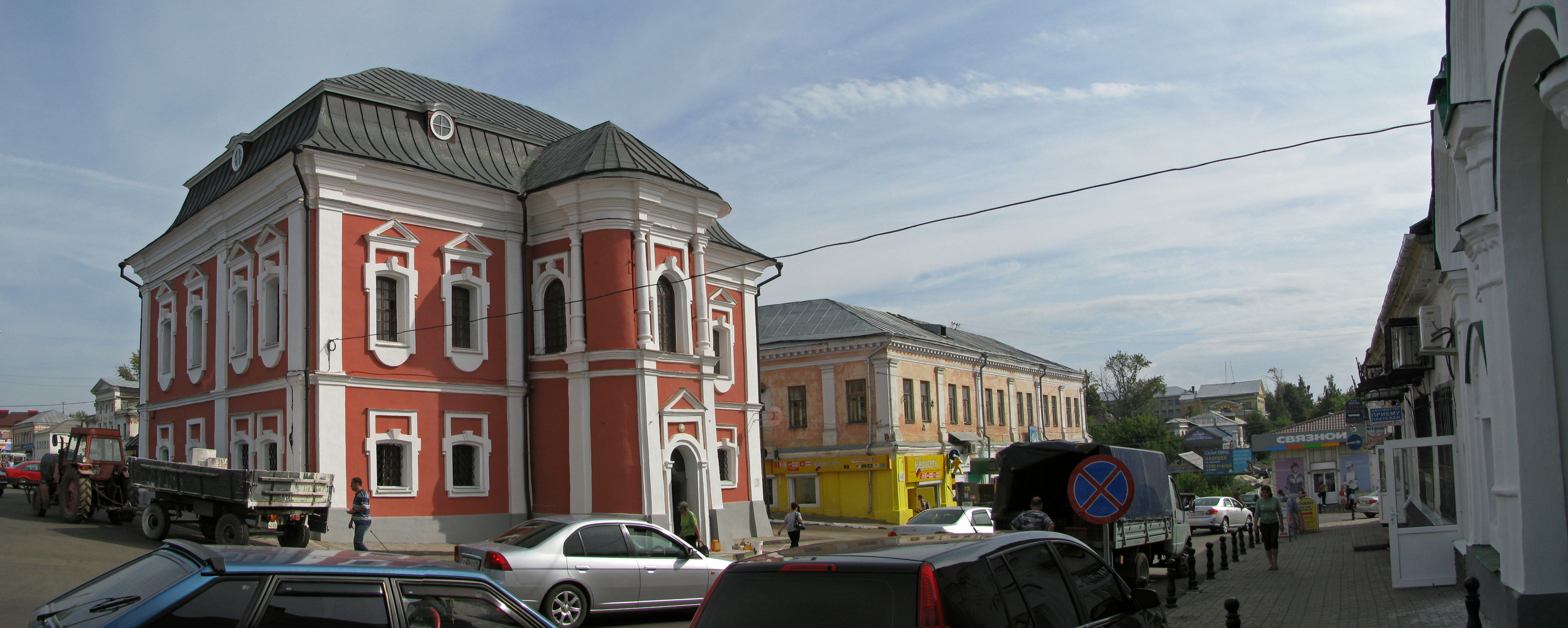 Магистрат (сер. XVIII в.), Соборная площадь